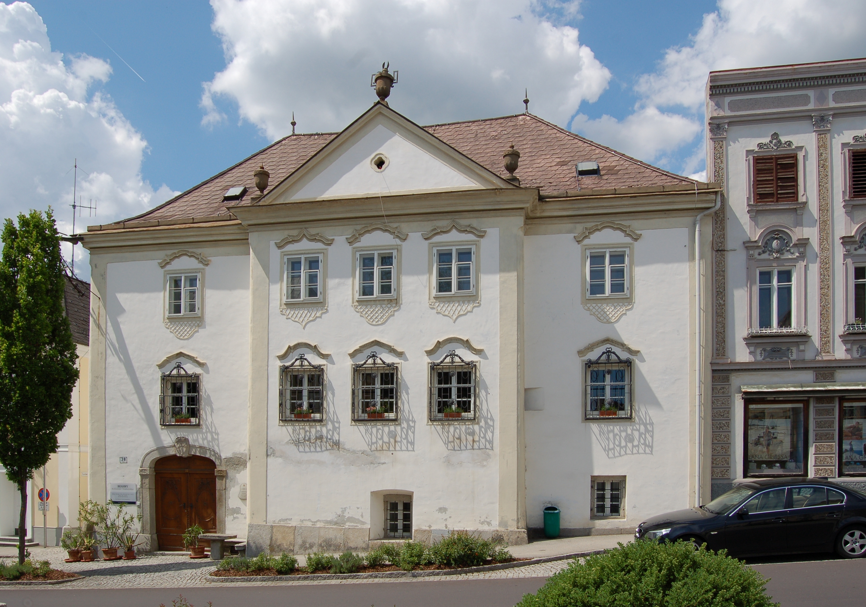 Das denkmalgeschützte Gebäude am Markt 38 in Neufelden in Oberösterreich (Bezirk Rohrbach).